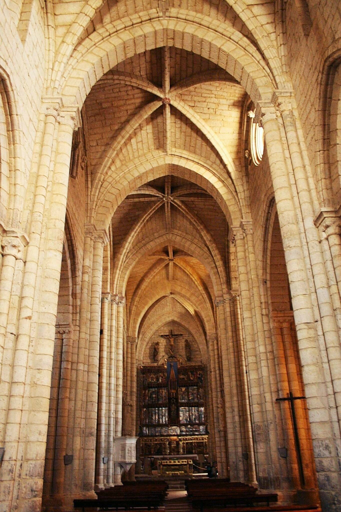 bóveda de la iglesia de Santa Maria la Blanca en Villalcazar de Sirga